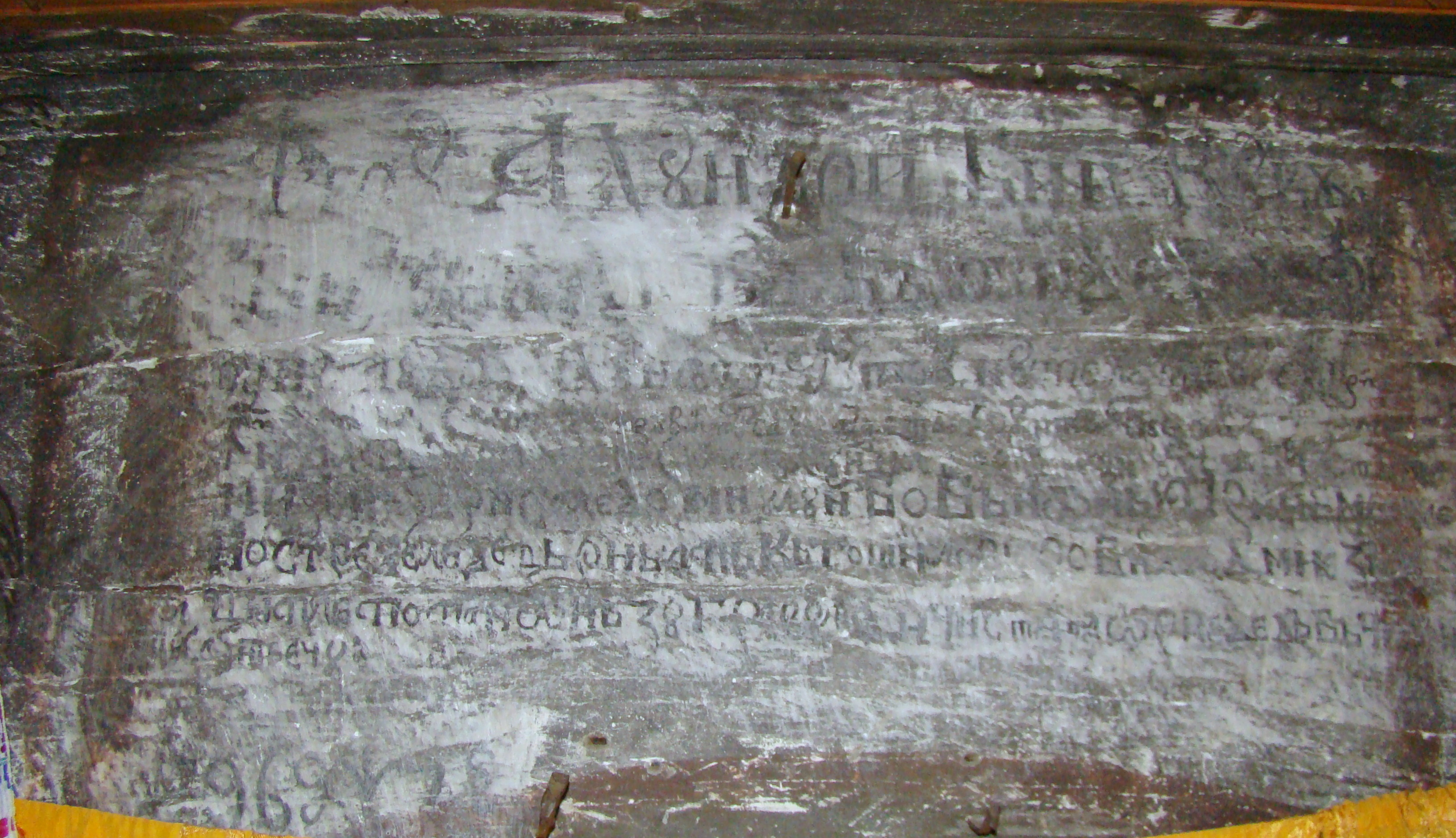 Biserica de lemn "Sfinții Arhangheli Mihail şi Gavriil" din Chieșd, județul Sălaj